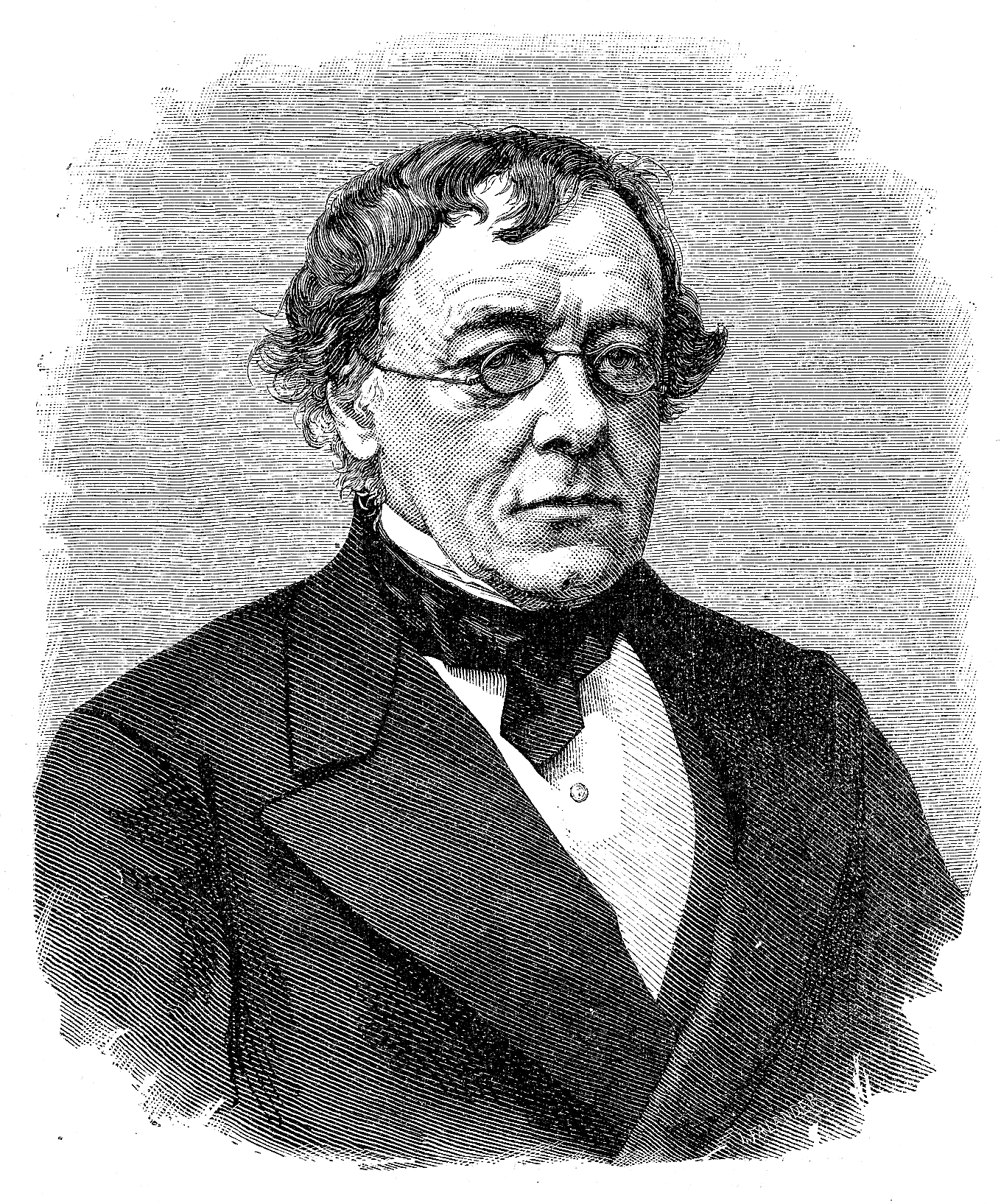 Wilhelm Erik Svedelius